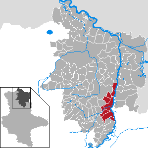 Verwaltungsgemeinschaft Tangermünde in Sachsen-Anhalt - Landkreis Stendal